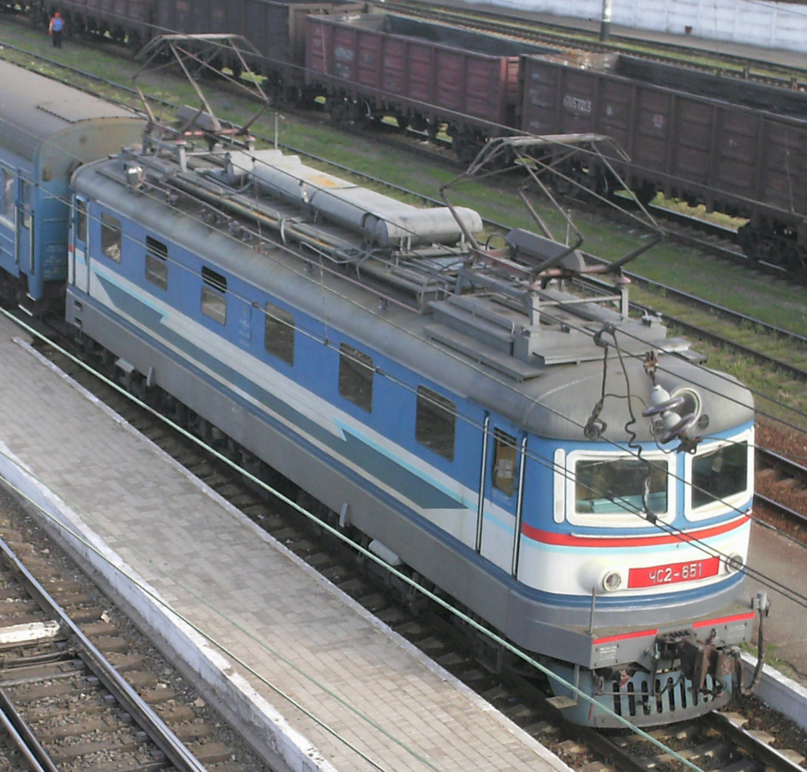 Электровоз ЧС2 в Славянске.